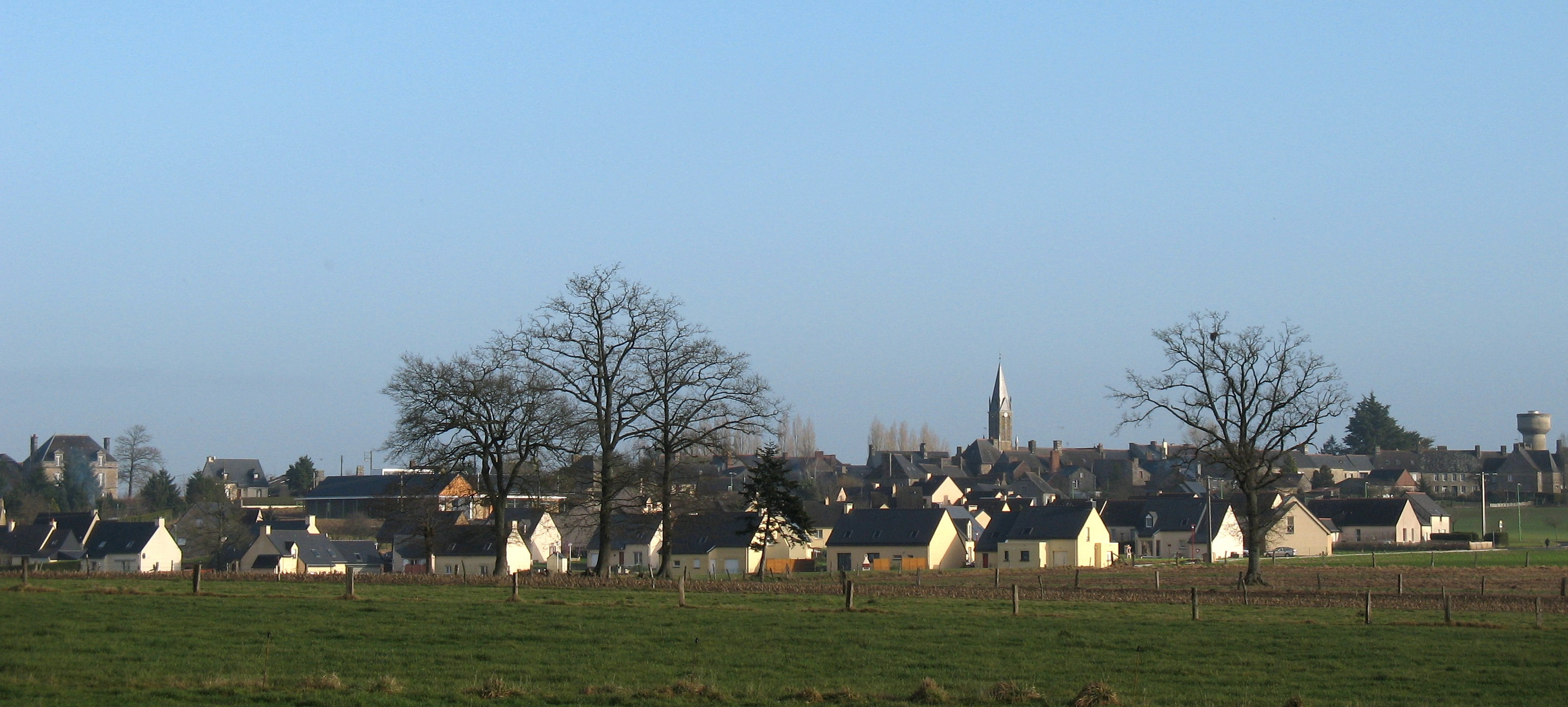 Saint-Hilaire-des-Landes vu du village Le Grand Bossard.